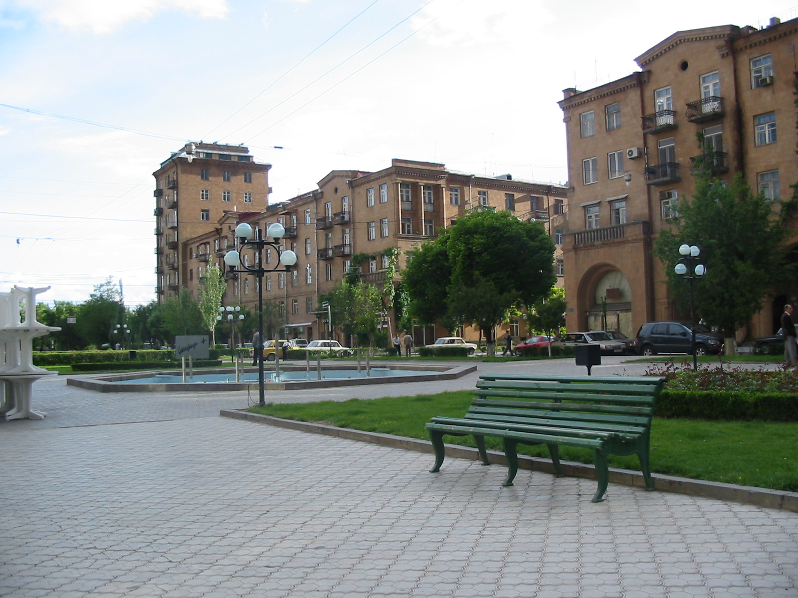 Tamanyan street in Yerevan